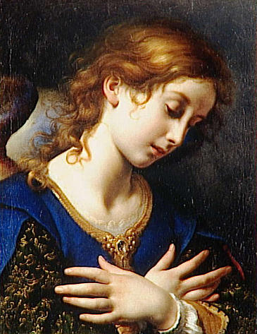 Angelo annunciante, o/tl, 52 x 40 cm, Louvre Paris